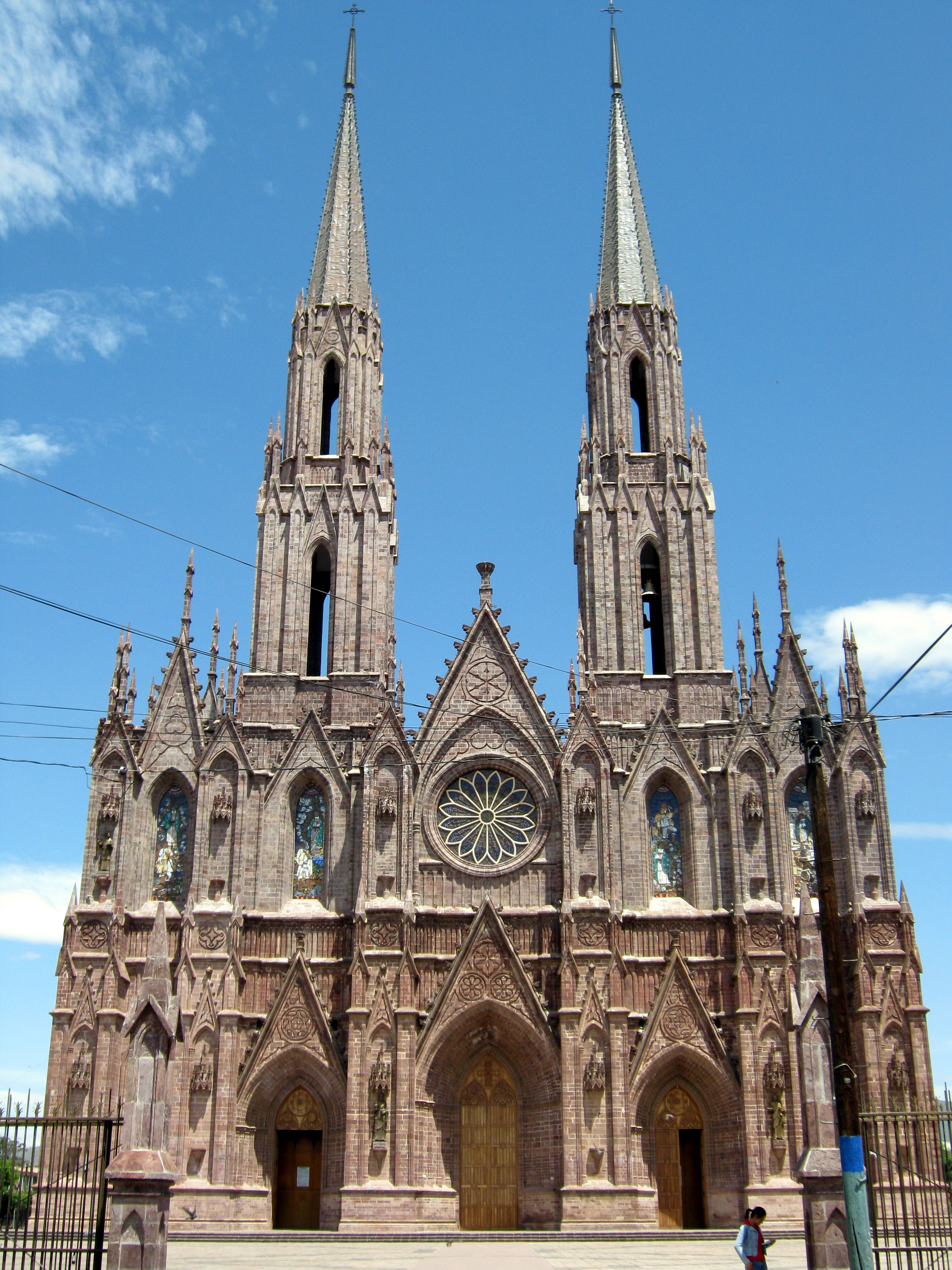 Santuario guadalupano de Zamora.